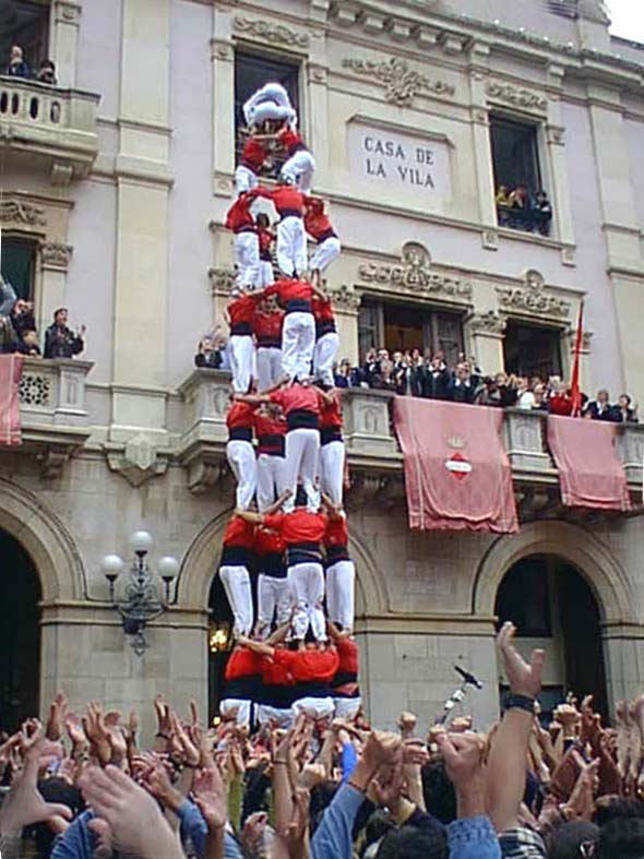 Primer 4d9sf(c) de la CJXV al segle XX i vist mai a Valls, Santa Úrsula, 24-X-1999. Foto feta per: Jordi Climent i Ferré.